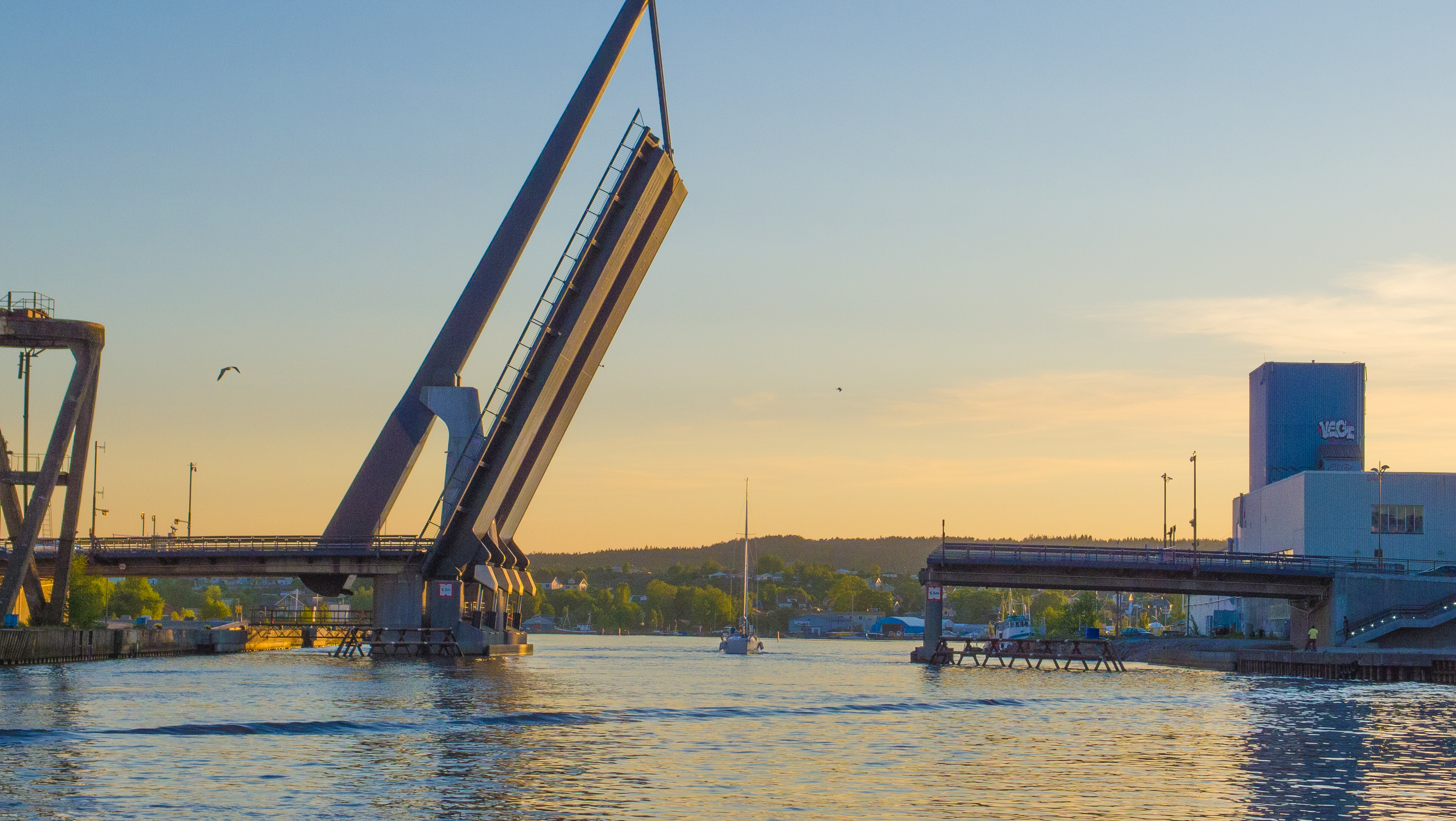 Fredrikstad